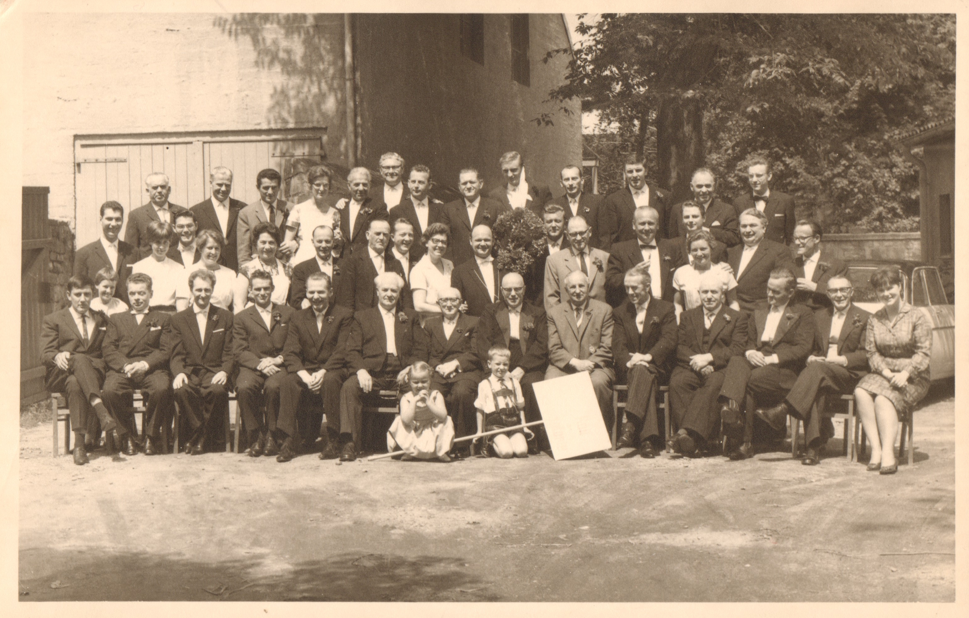 Gründungsjahr 1963